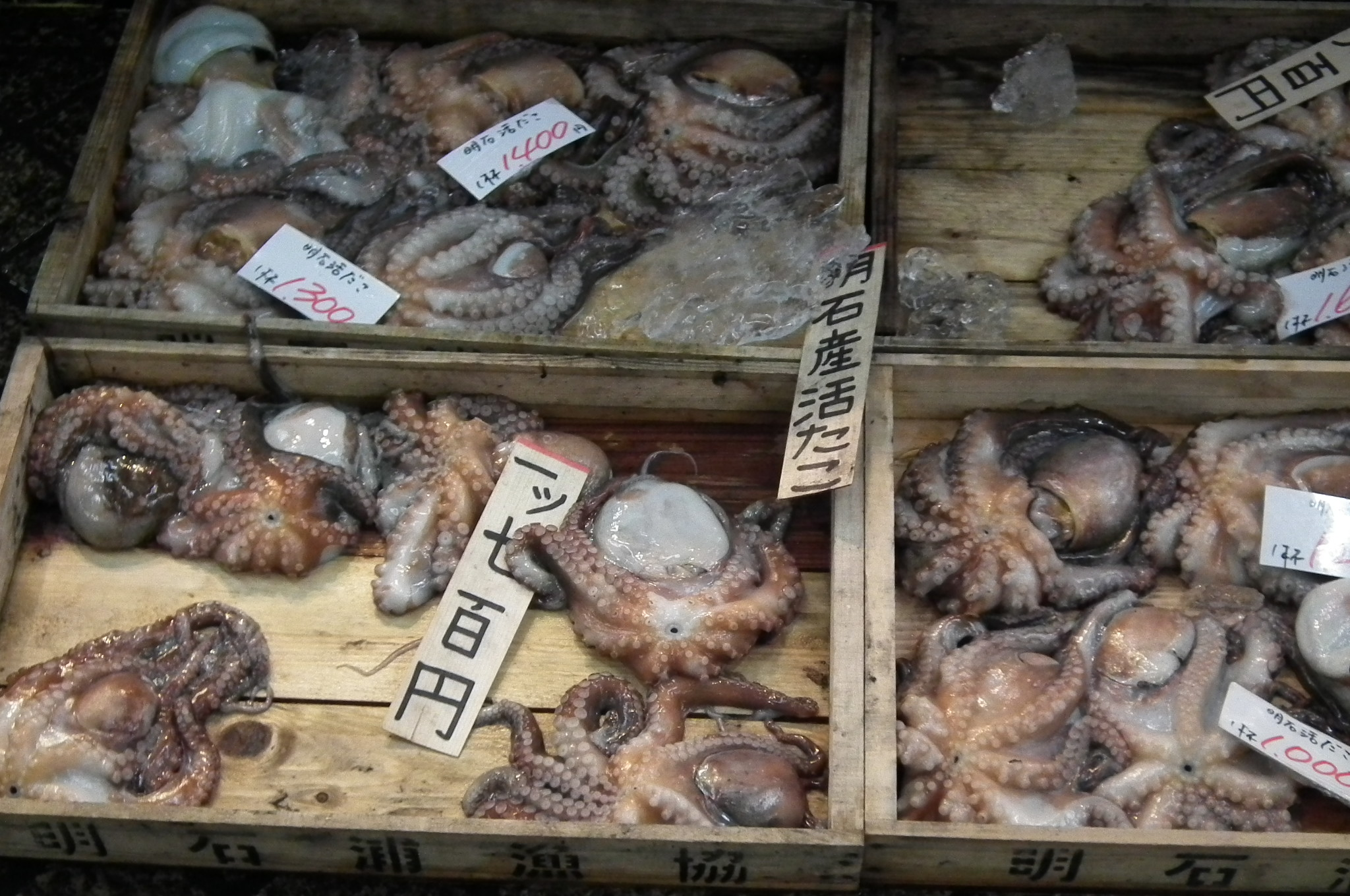 Octopus-Uontana Akashi Honmachi 明石本町魚の棚のタコ